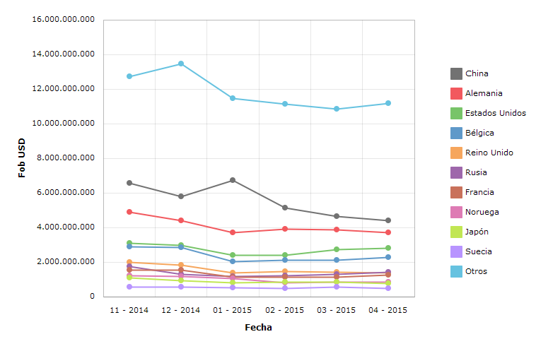 Importaciones de los Países Bajos del periodo noviembre 2014-abril 2015 medidas en valor FOB